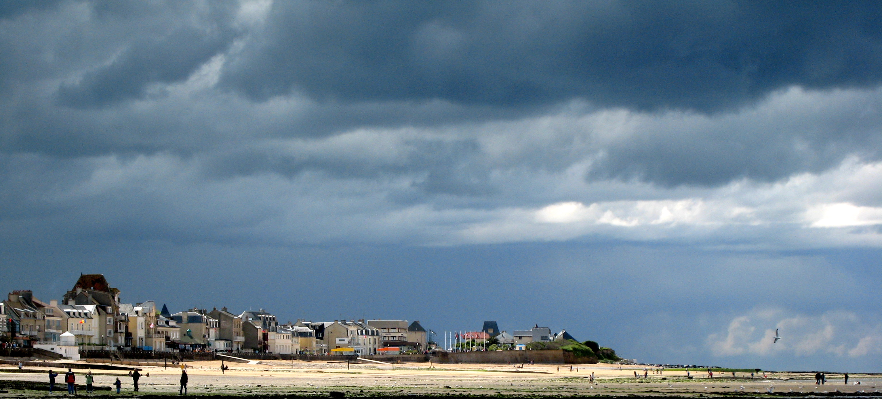 Saint Aubin sur Mer, Calvados, France